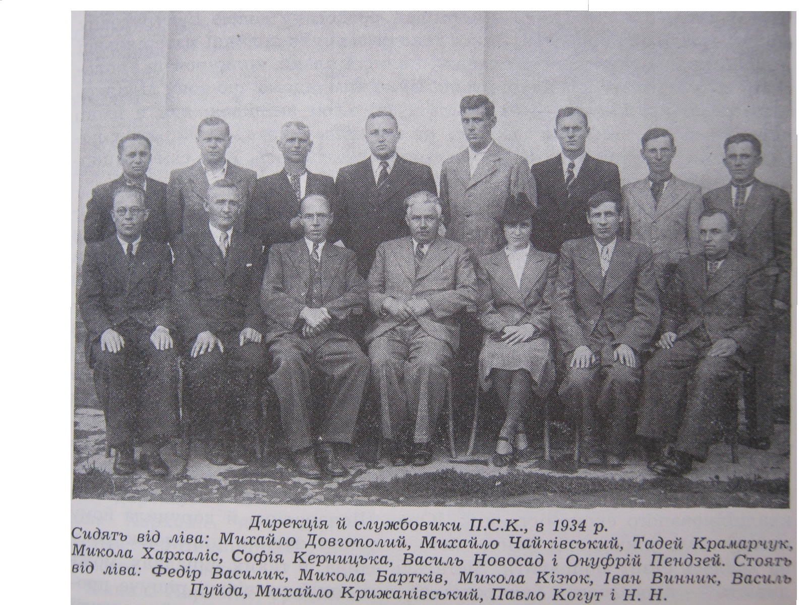 Керівництво Повітового Союзу Кооператив. Бучач